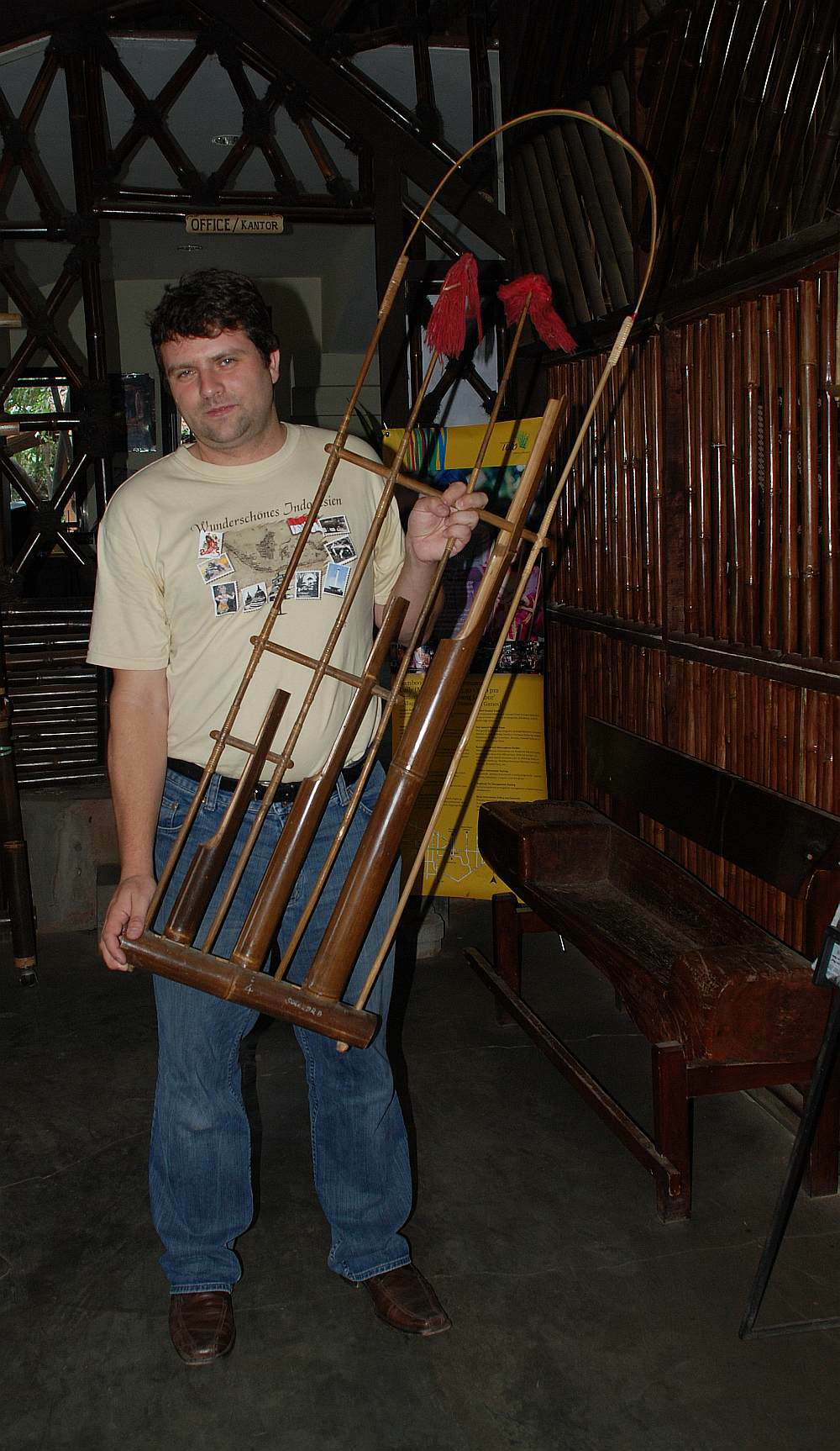 Ein Baduy-Bass in der Hand des Hauptautors dieses Wikipedia-Artikels.